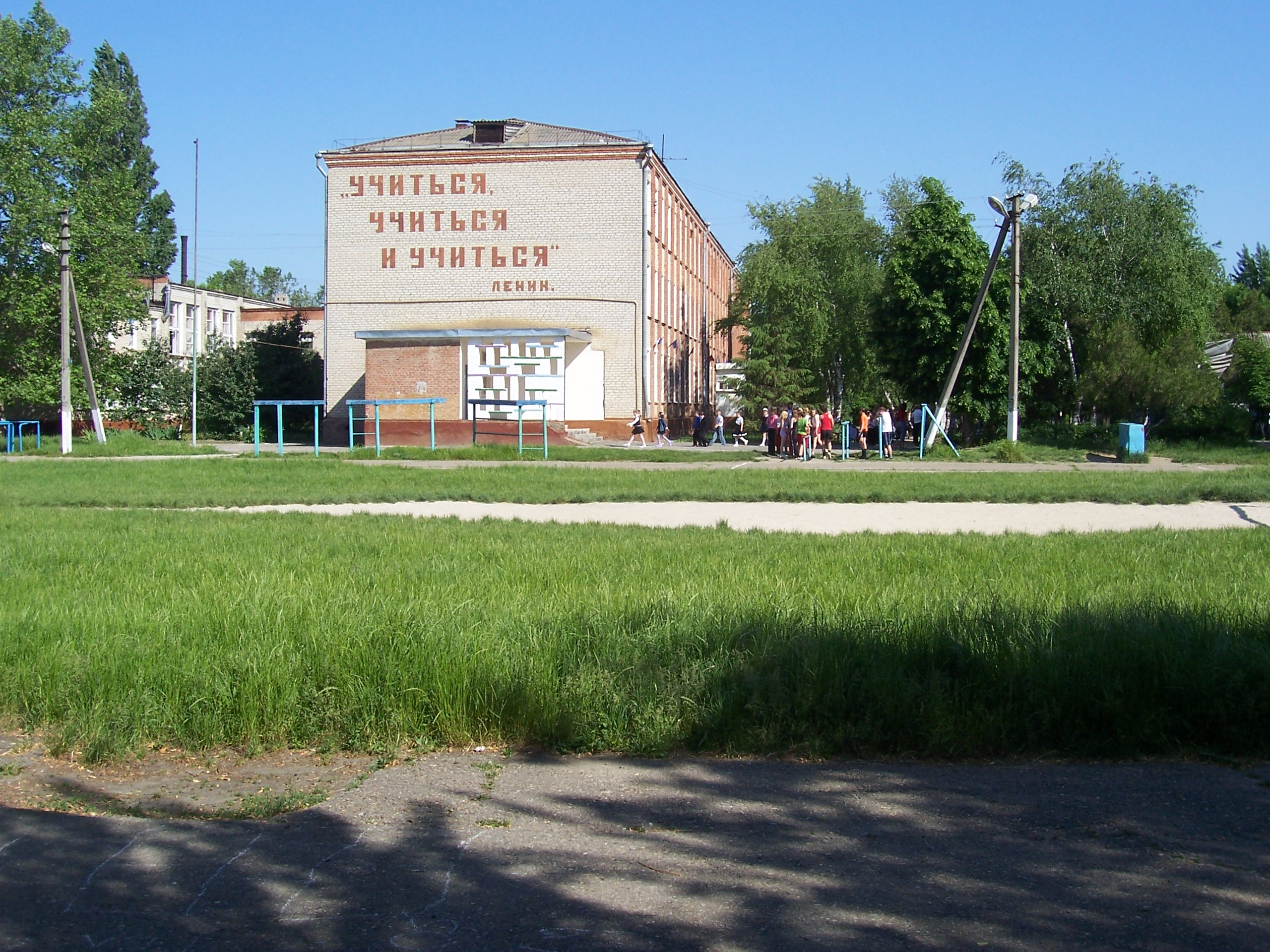 Schule Nummer 1